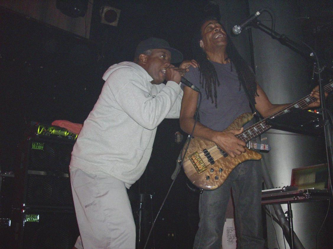 Sala Heineken Madrid , 23 Sept 2008